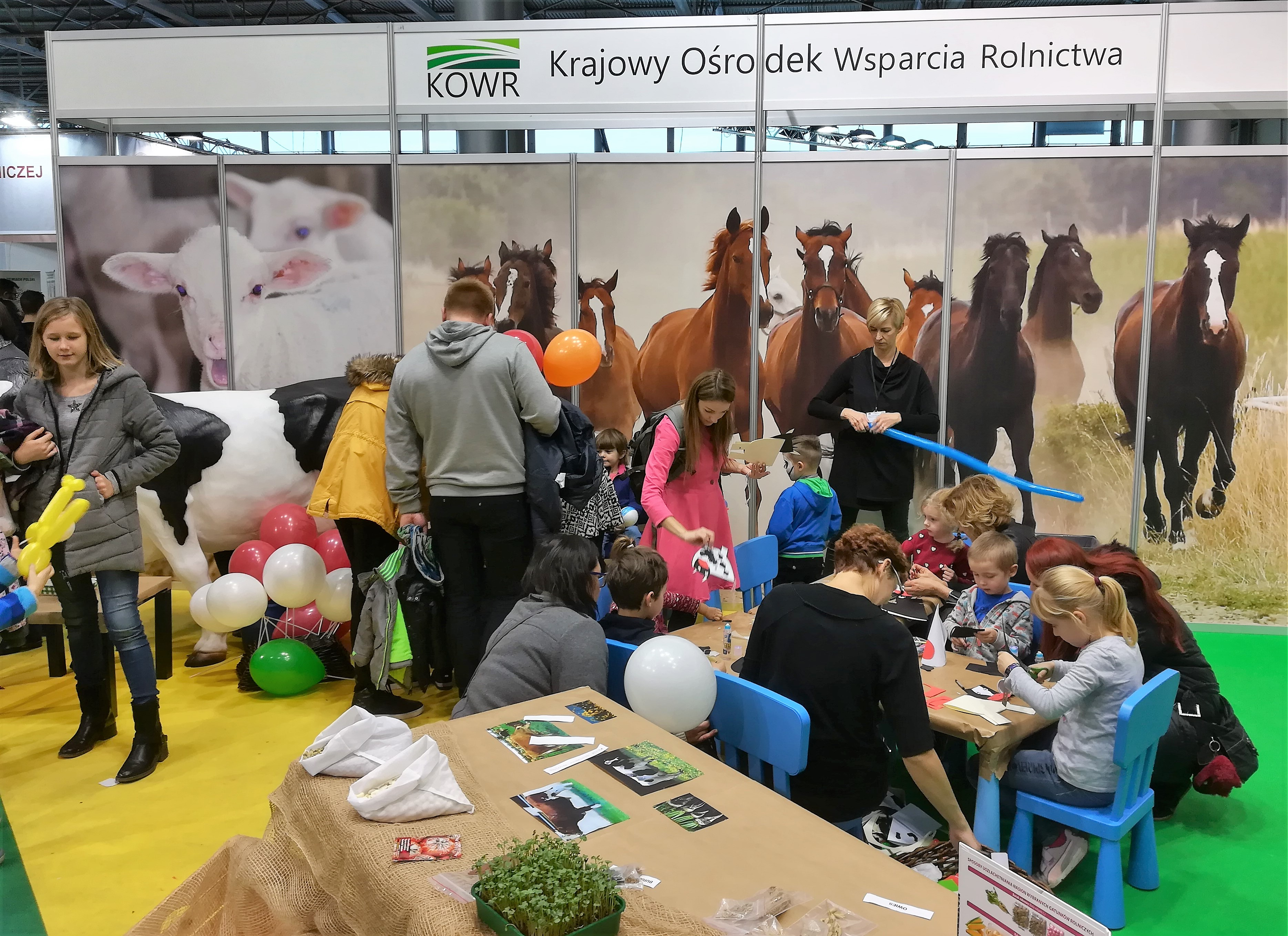 Narodowa Wystawa Rolnicza w Poznaniu na MTP z okazji 100-lecia odzyskania niepodległości.